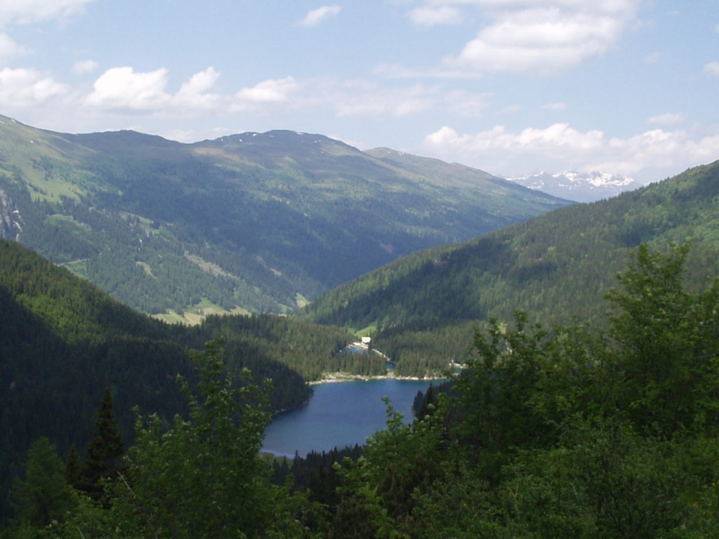 Obernberger See, Blick nach Norden This media shows the natural monument in the Tyrol with the ID ND_3_26.